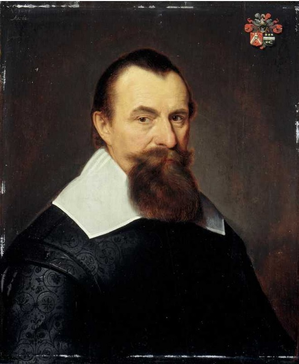 Marcus Mamuchet (1575/1576-na 1638)